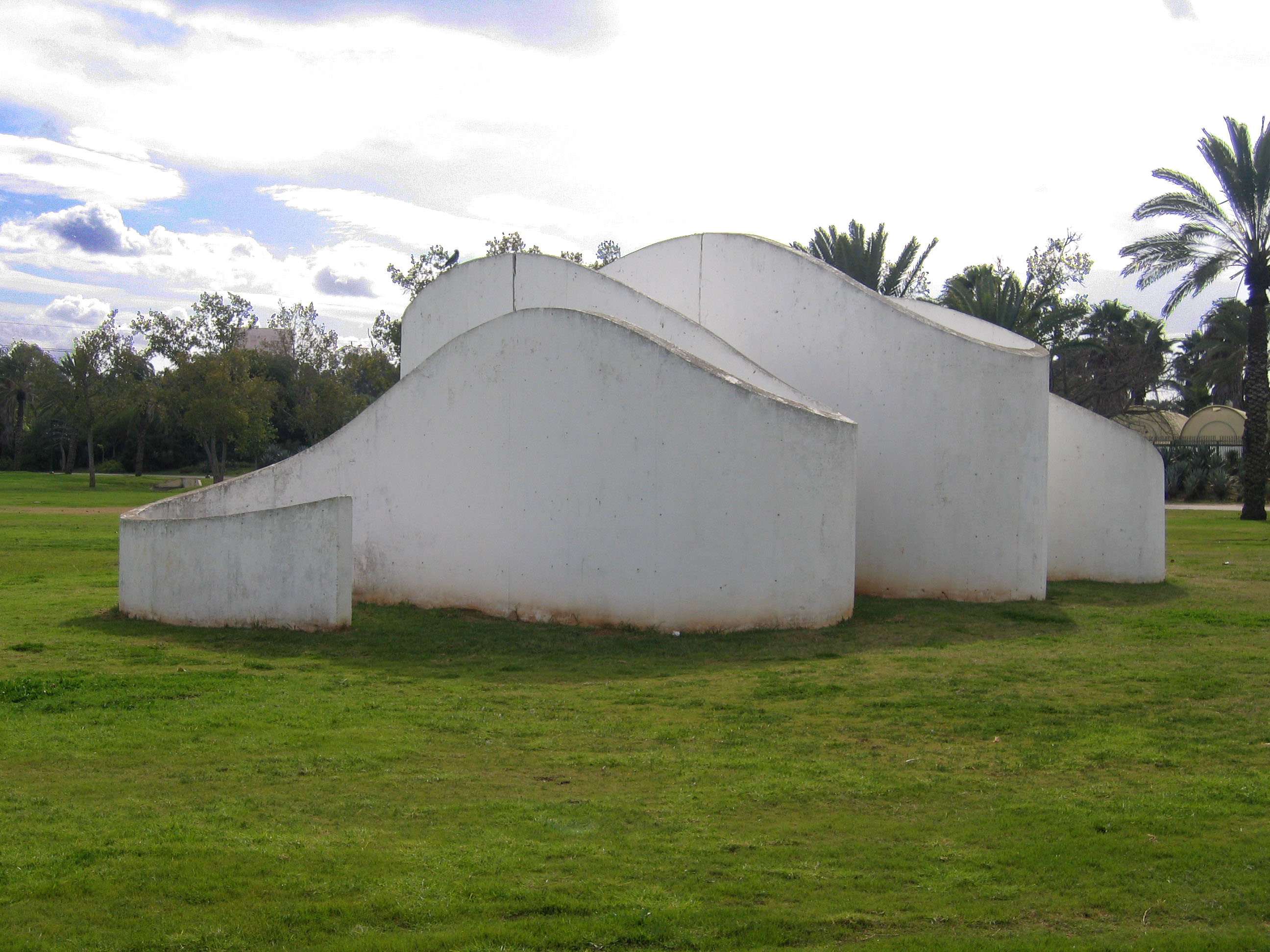 Sculpture